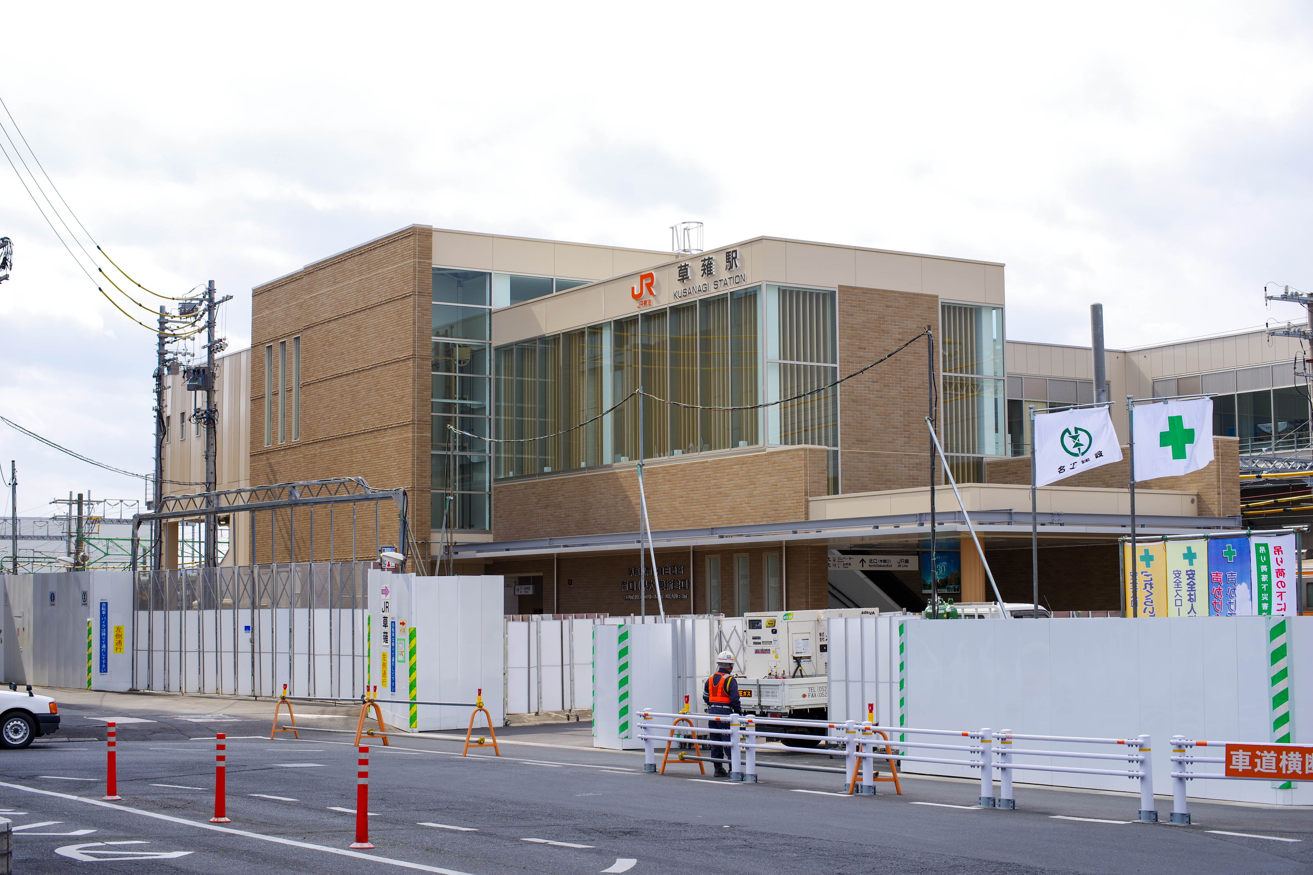 東海旅客鉄道株式会社東海道本線草薙駅南口